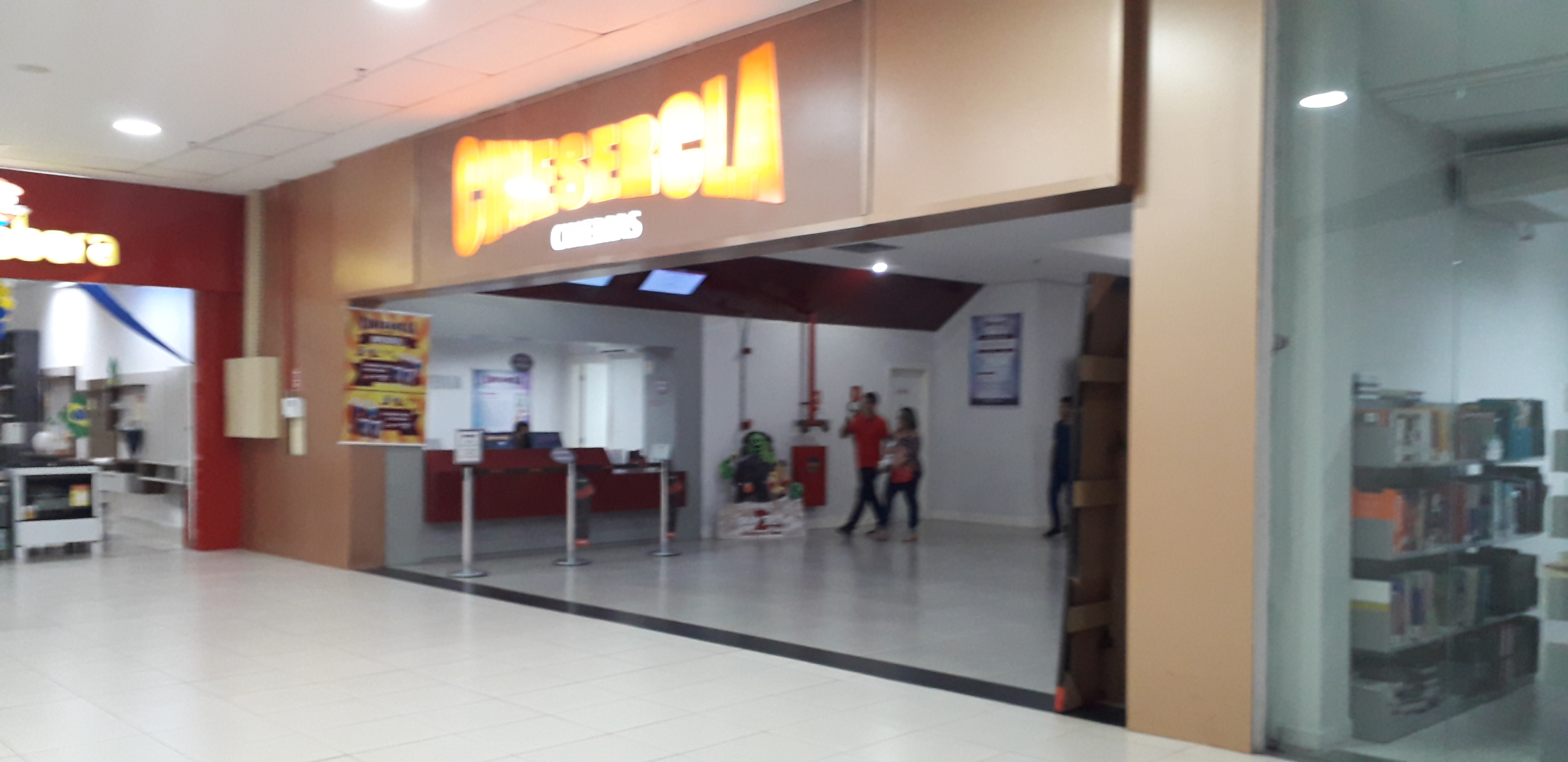 imagens do Cinesercla instalado no Shopping Prêmio de Nossa Senhora do Socorro, SE